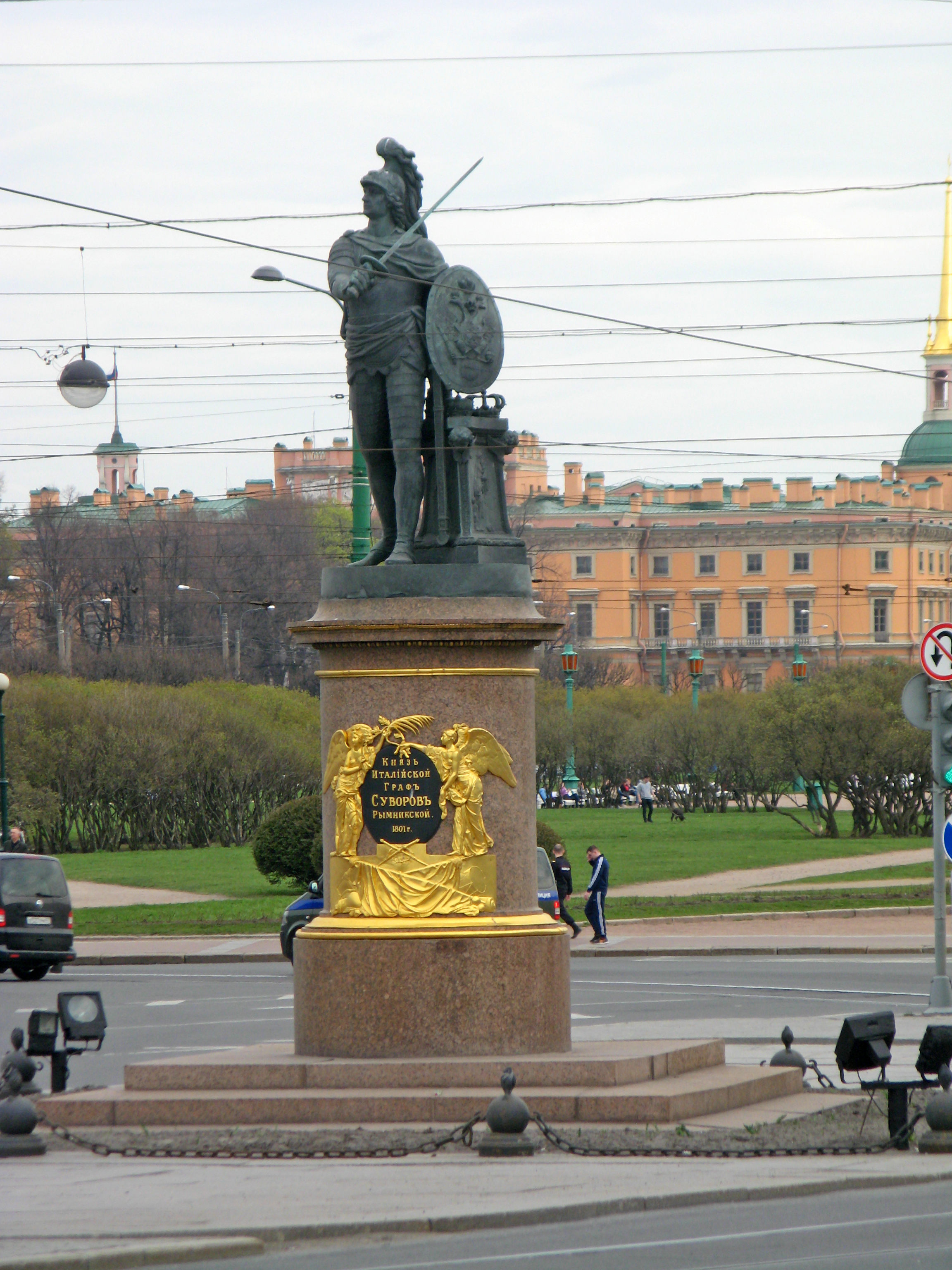 Памятник полководцу А.В. Суворову: Суворовская площадь, Центральный район, Санкт-Петербург